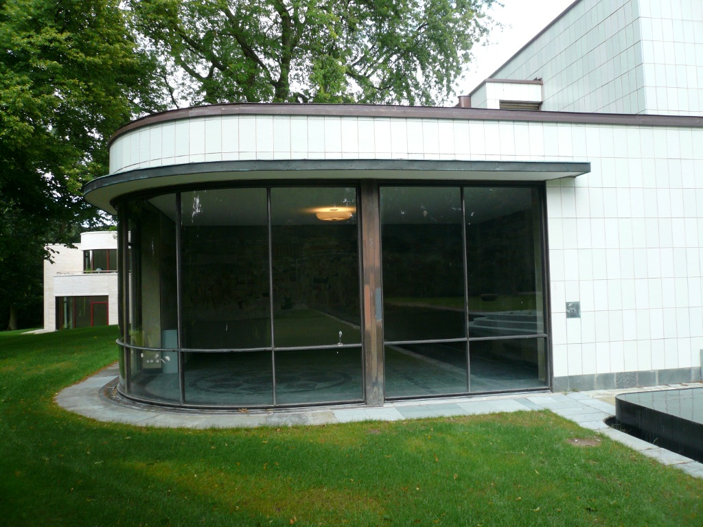 Haus K. in O. -Villa Reemtsma - in Hamburg Othmarschen : Gartenzimmer